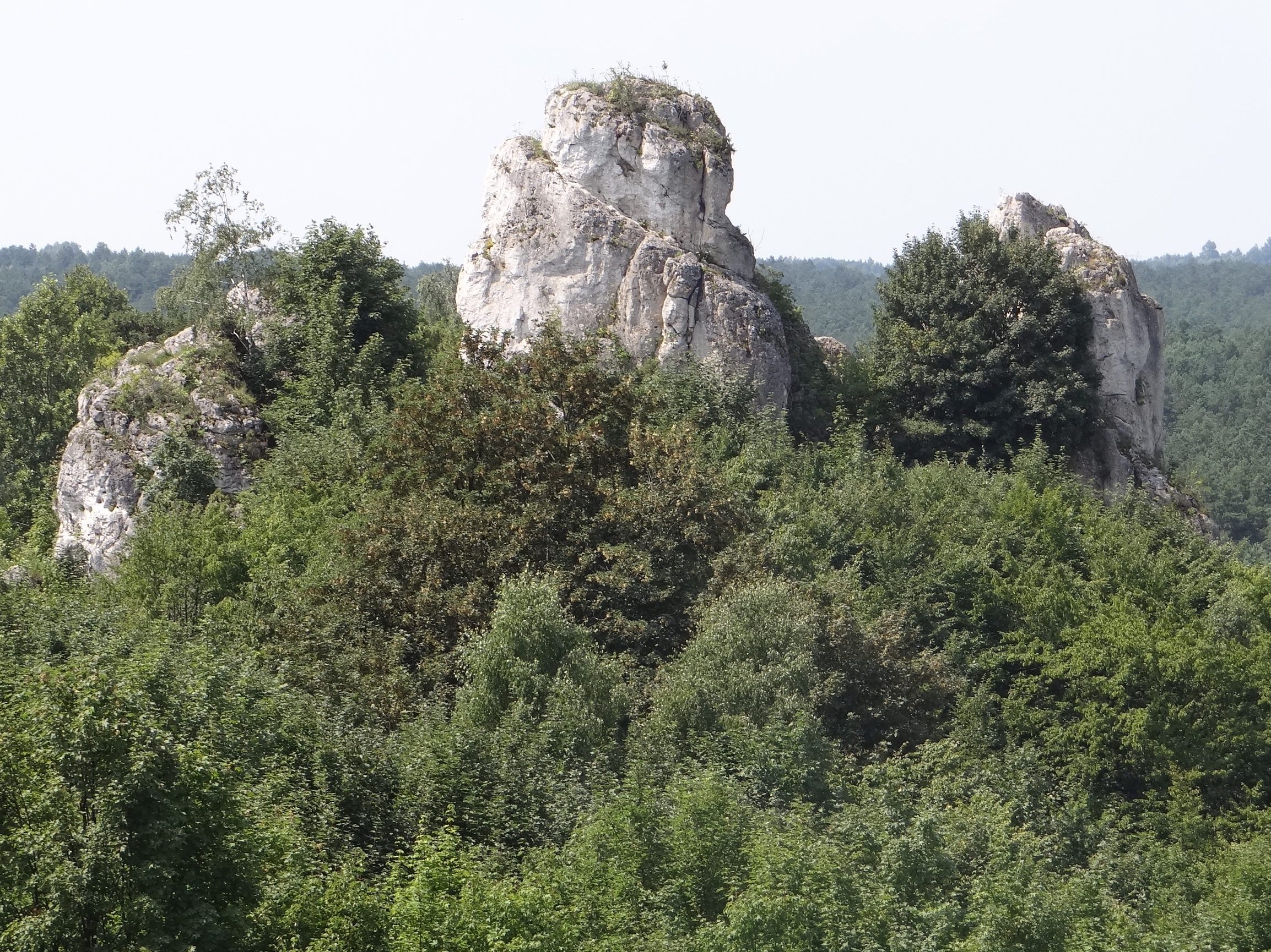 Grupa Knura, widok z Grupy Łysej